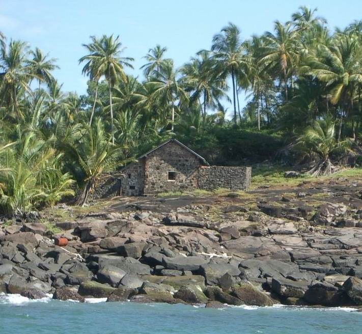 Hütte von Alfred Dreyfus auf der Teufelsinsel (selbst fotografiert)